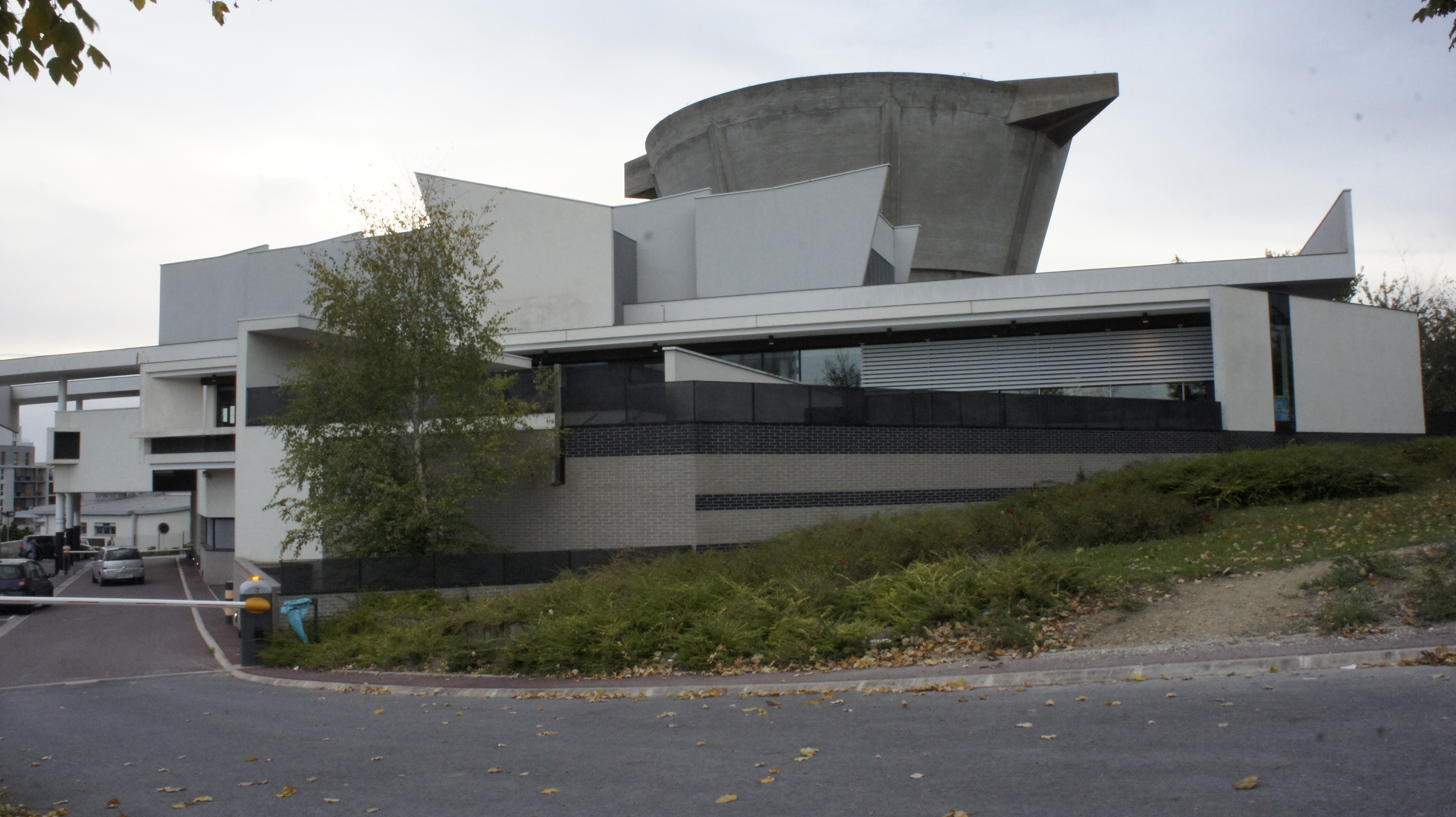 Bibliothèque et château d'eau à Croix Rouge, elle fait partie du réseau de médiathèques de Reims.